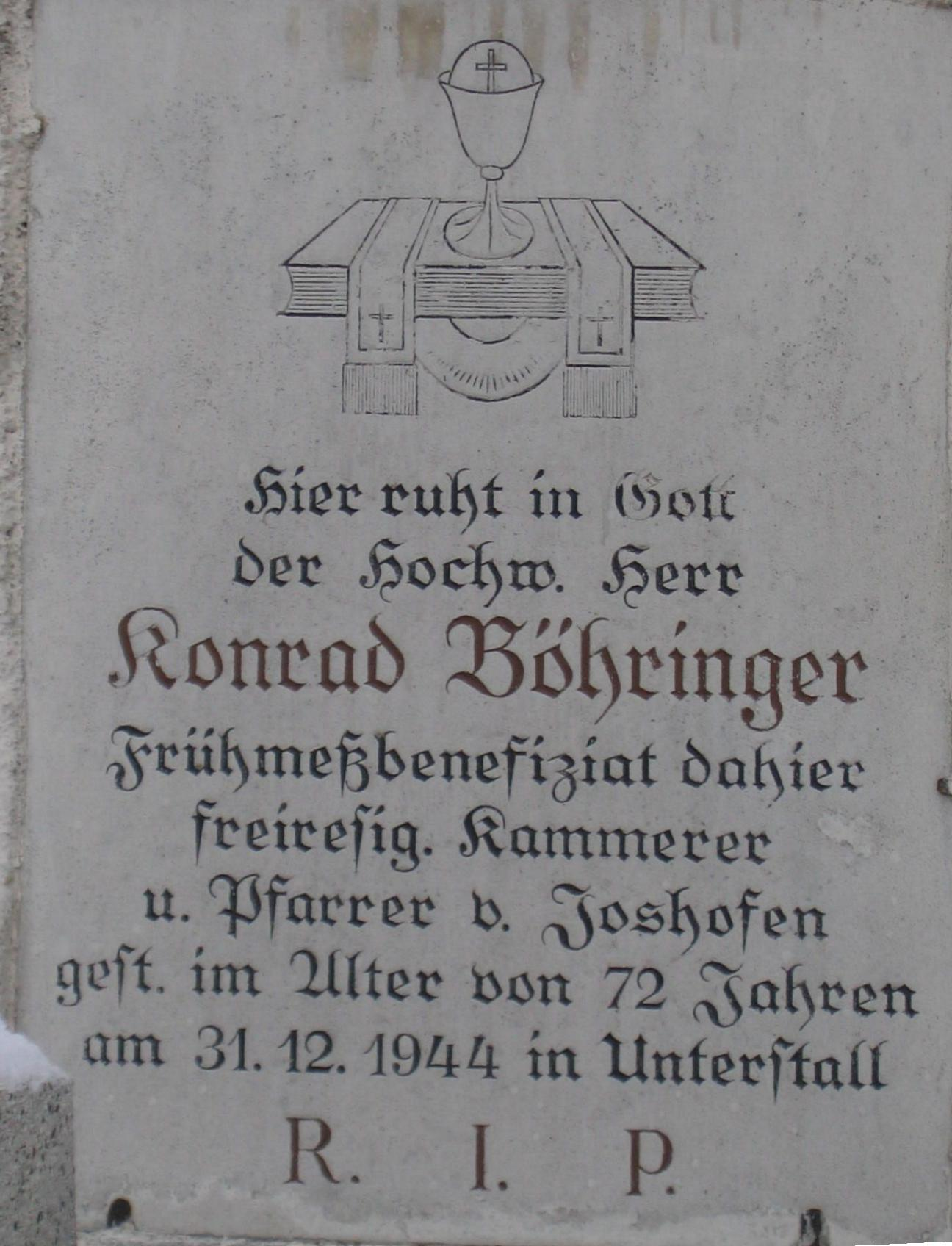 Gedenkstein für Pfarrer Konrad Böhringer aus Josshofen.